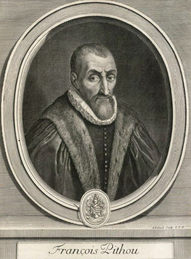 François Pithou par Gérard Edelinck